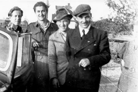 Henryk Flame po amnestii w 1947r.